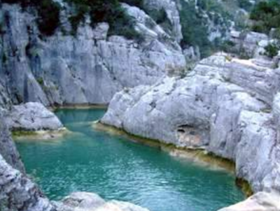 Canyon du Ravin des Arcs dans les Gorges du Lamalou.